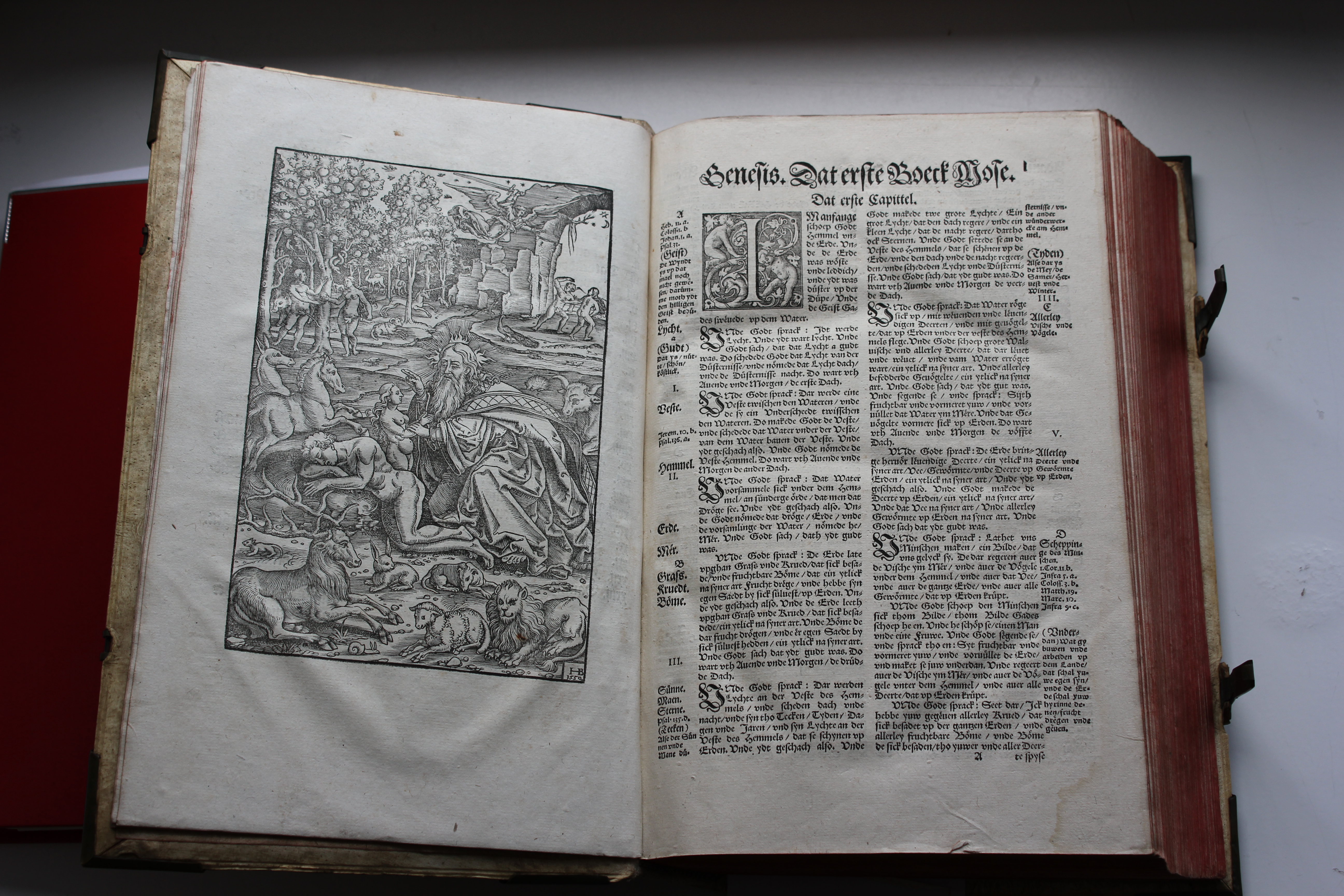 LZB in Flensburg - Niederdeutsche Lutherbibel von 1574-1580, Bild 05